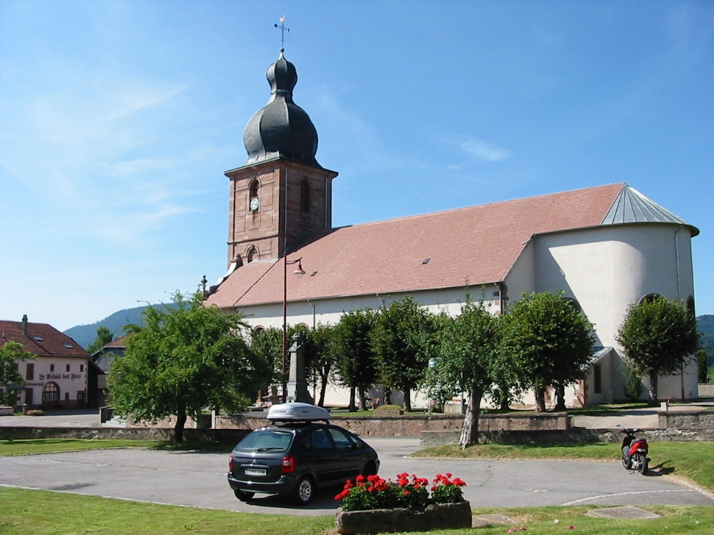 Bertrimoutier, département des Vosges. L'église vue du parc.